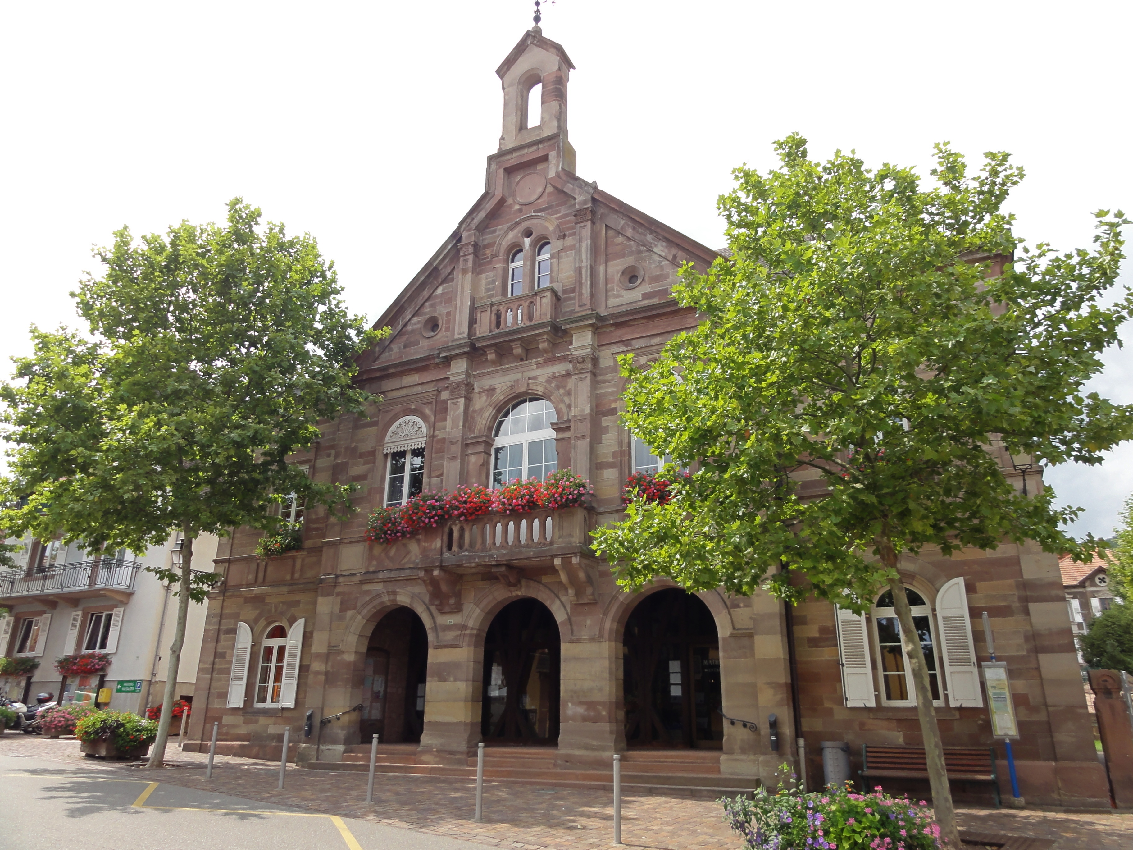 Alsace, Bas-Rhin, Kintzheim, Mairie (XIXe), 50 rue de la Liberté